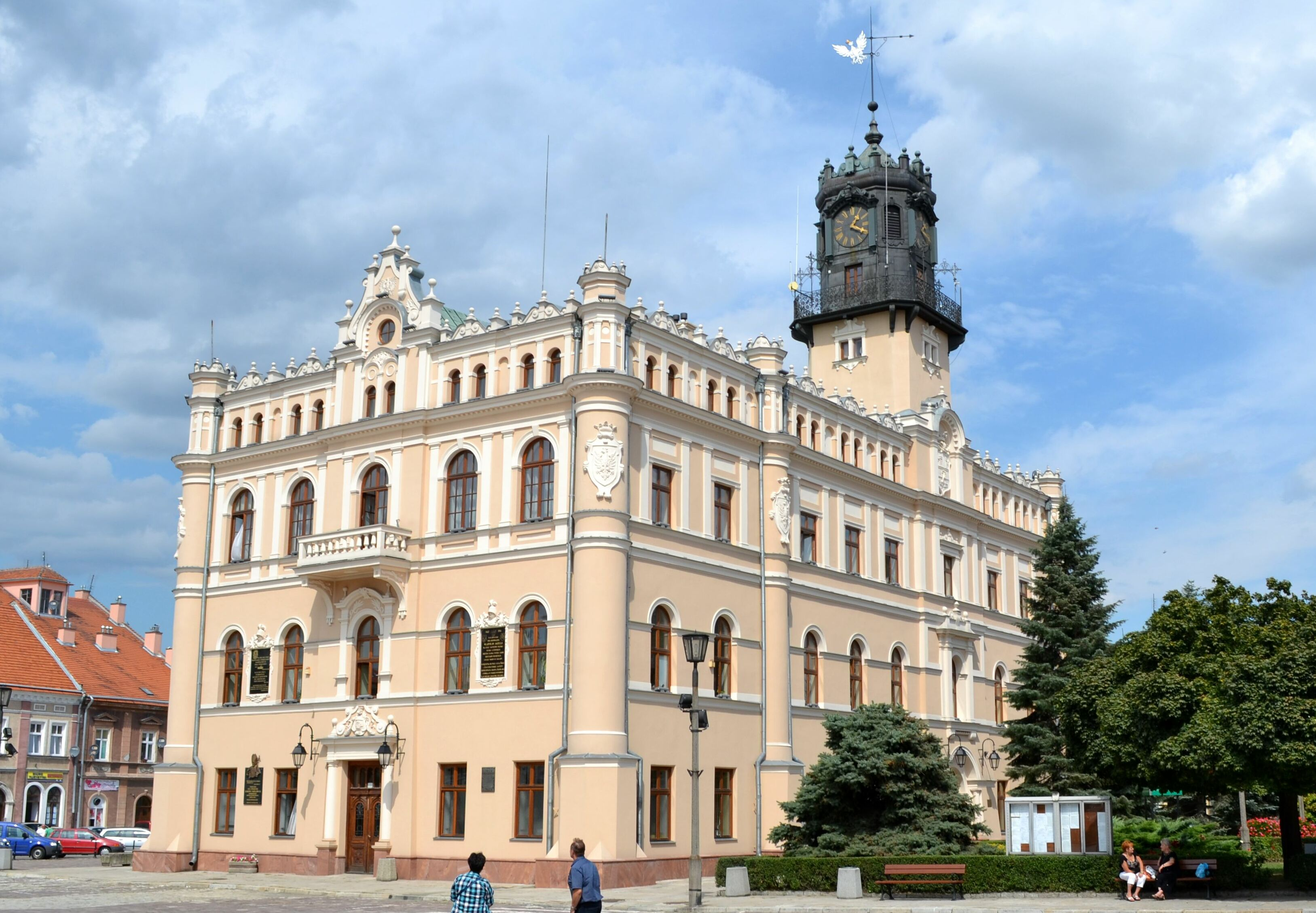 Jarosław, ratusz, kon. XV - 1906